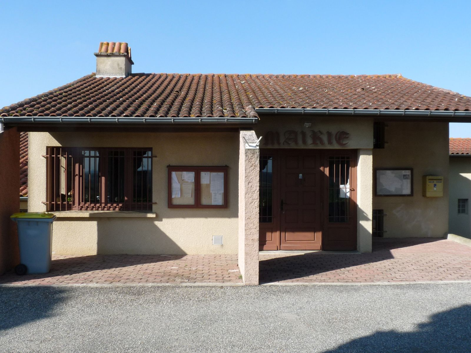 Mairie de Pouze, Haute-Garonne, France